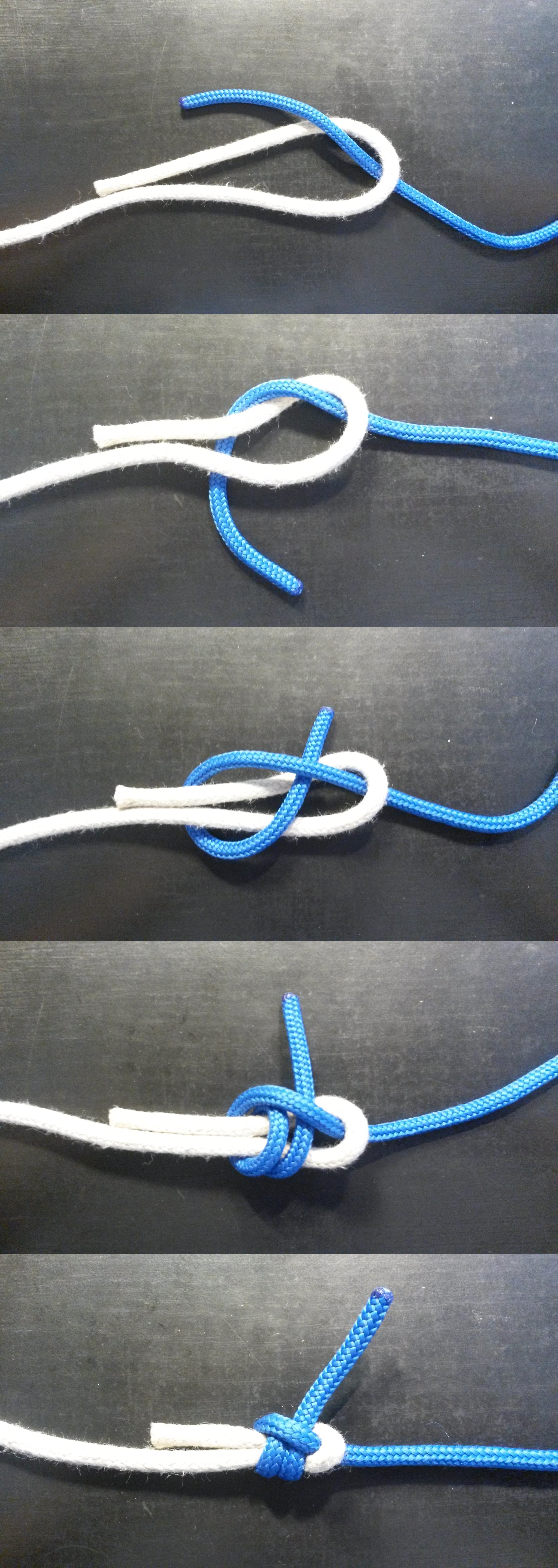 Anfertigung eines Doppelten Hinterstiches